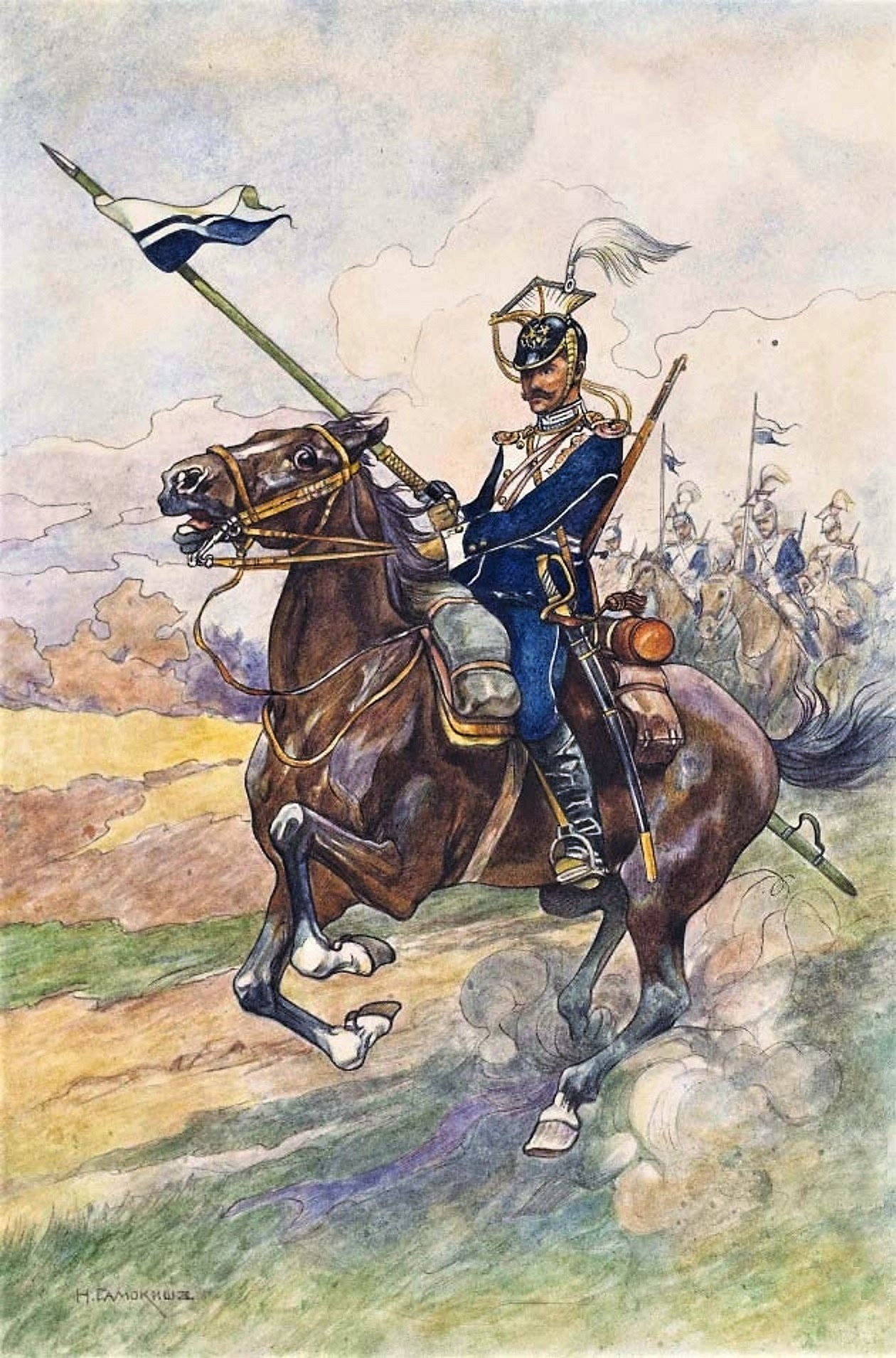 Николай Самокиш. Рядовой 11-го уланского Чугуевского Её Величества Марии Федоровны полка. Почтовая карточка